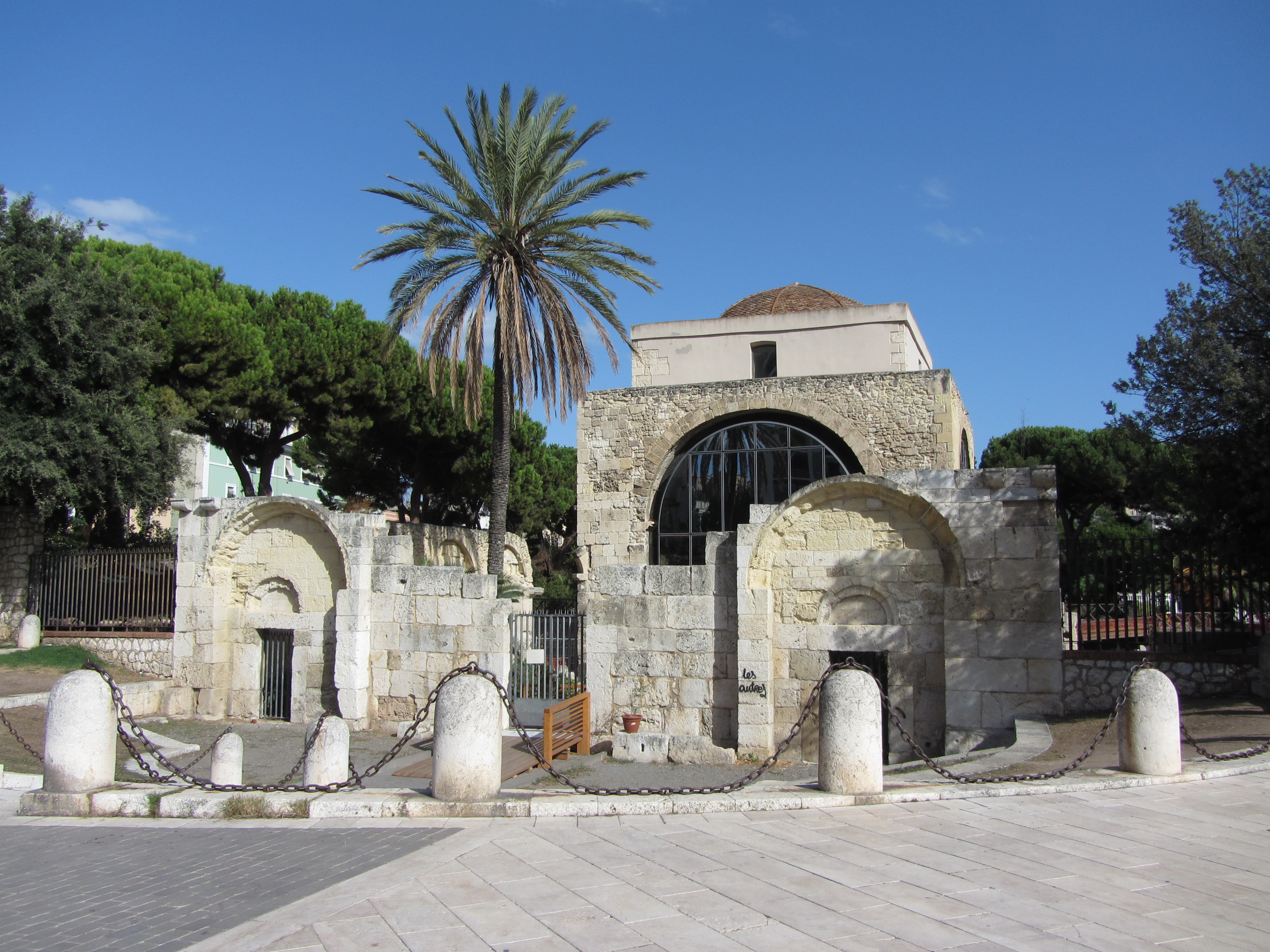 Basilica di San Saturnino - 092009546-MIBAC This is a photo of a monument which is part of cultural heritage of Italy.